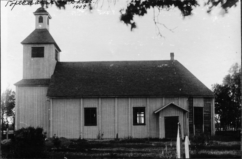 Kyrkan från söder. Kategori: (01) ExteriörerKyrkan från söder.